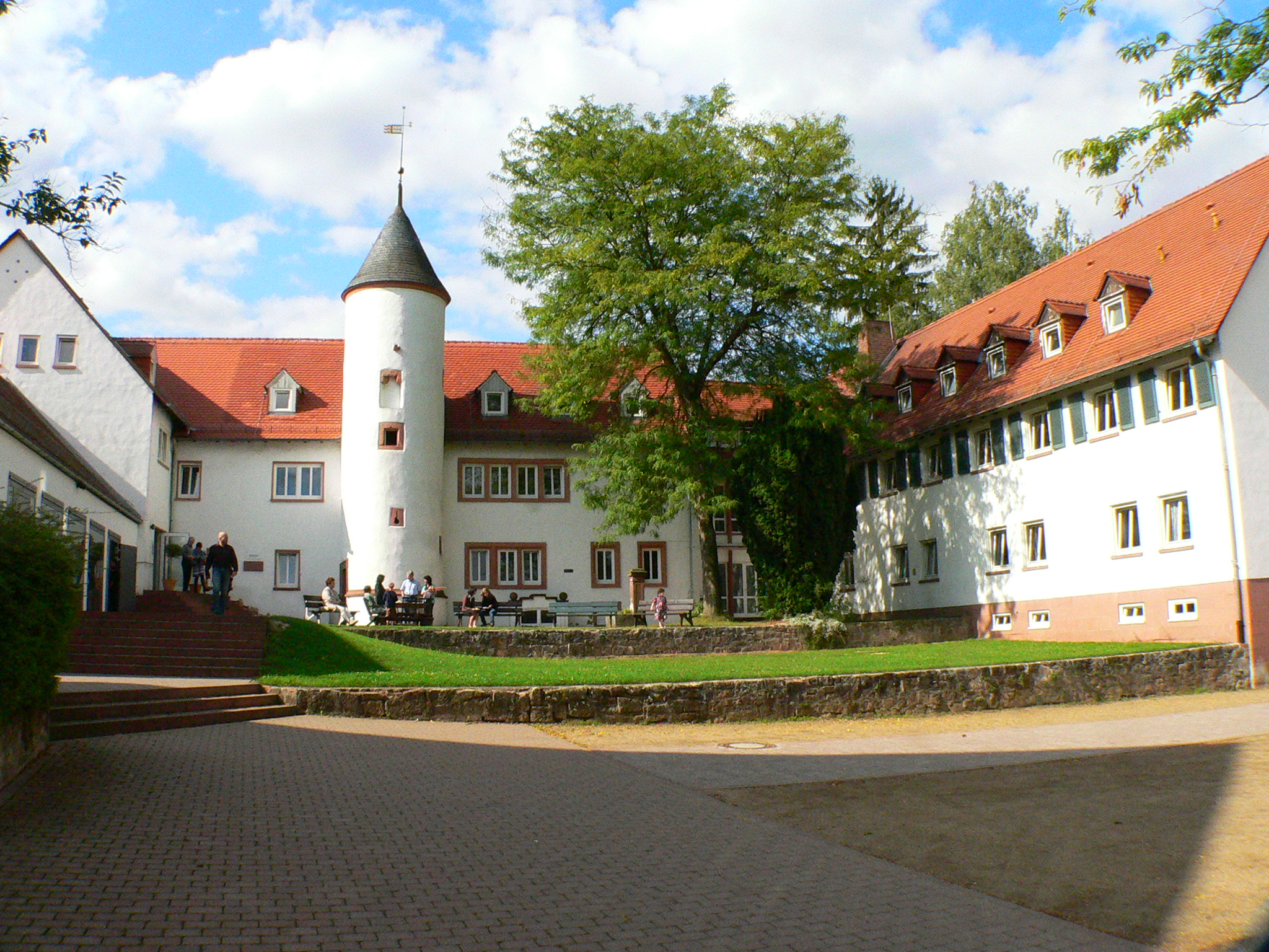 Kloster Höchst (Odenwald, Deutschland): Terrassenhof mit Propsteibau, Treppenturm (um 1200) und Neuem Bau (1962)